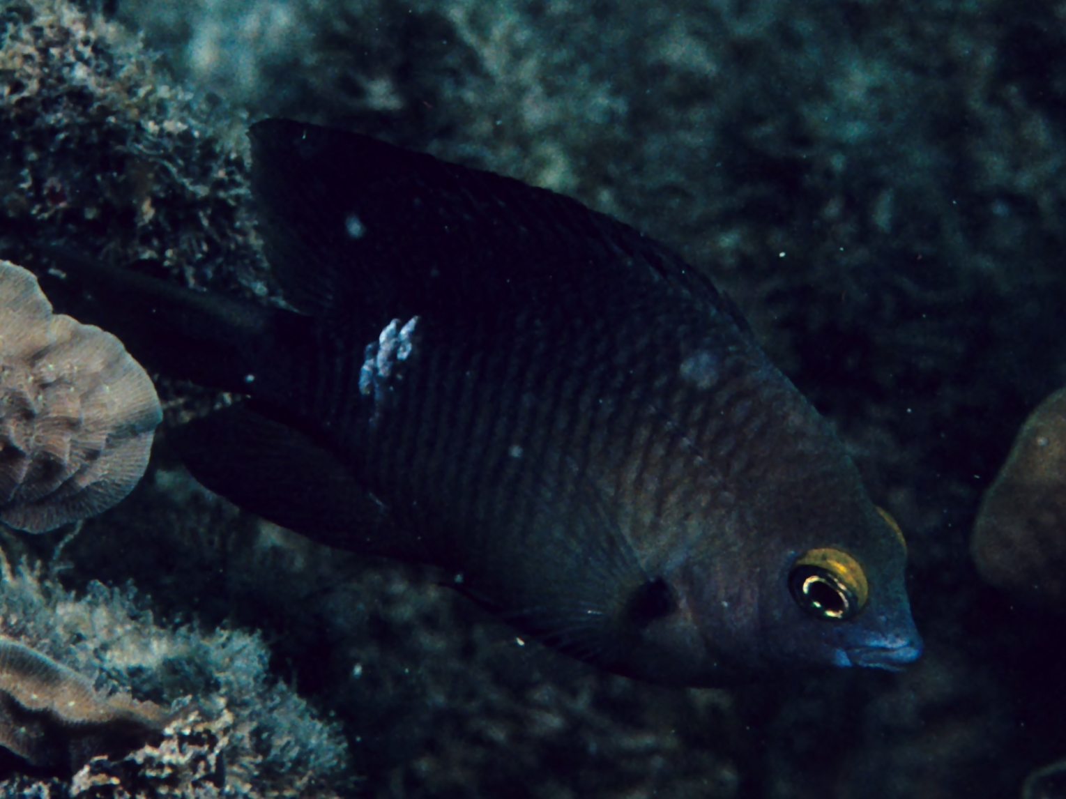 Stegastes planifrons en Caribe, 2013